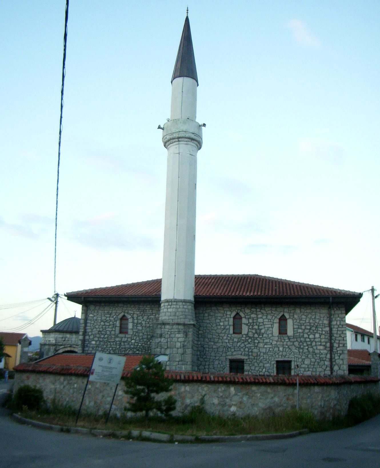 Mosque of Podgorica, Montenegro